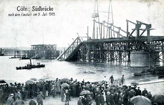 Cologne, écroulement du Pont sud (9 juillet 1908)